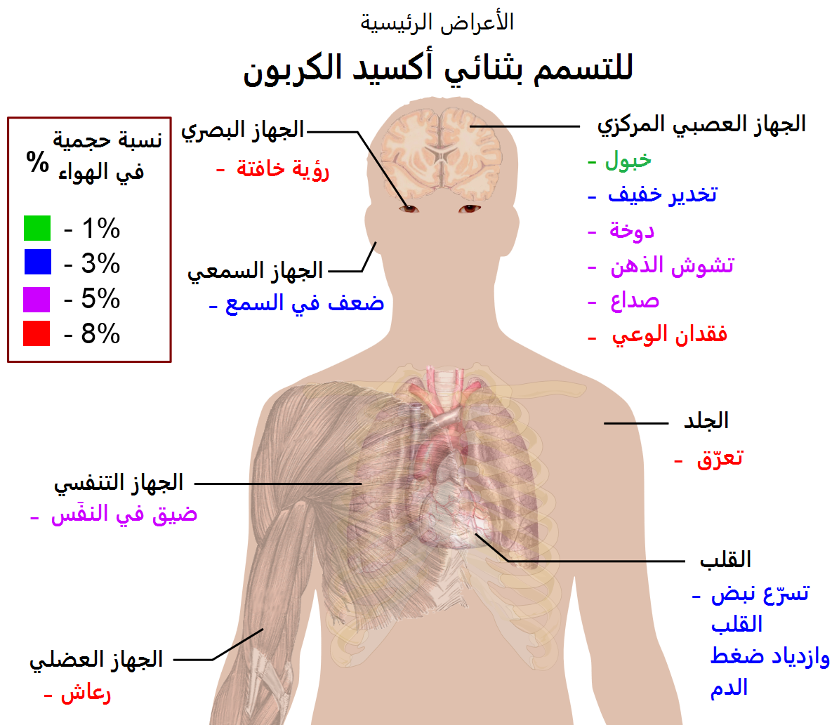 أعراض التسمم بثنائي أكسيد الكربون